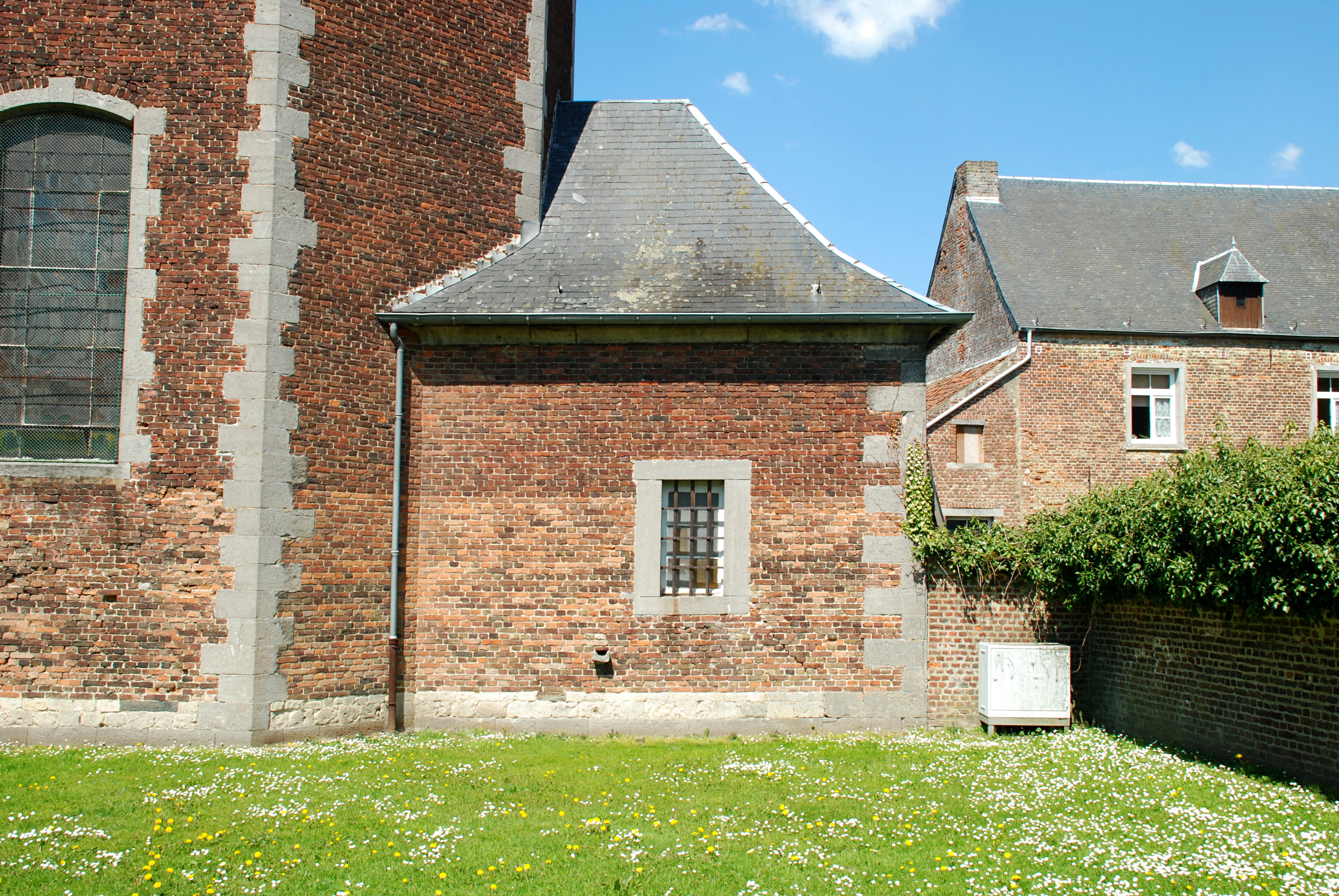 Belgique - Brabant wallon - Église Saint-Martin de Ways